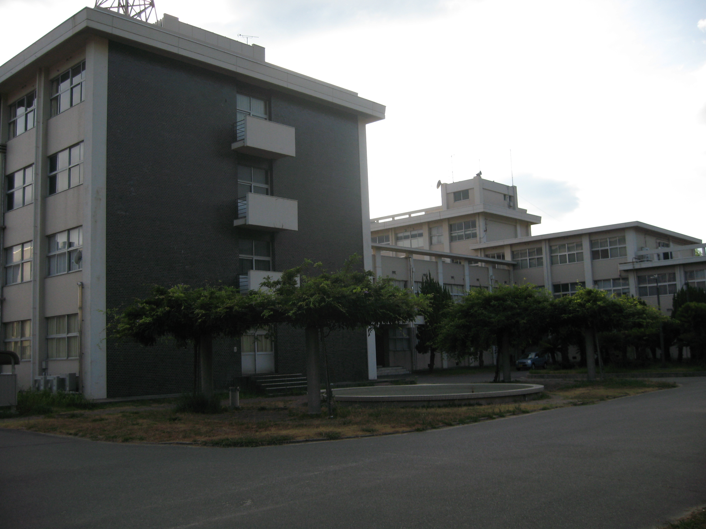 大島商船高等専門学校(建物）